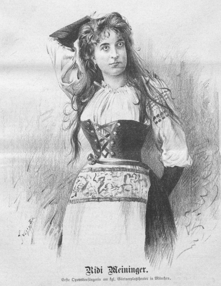 Ridi Meininger, deutsche Operettensängerin, Titelblattzeichnung Der Humorist, 14. Jg., Nr. 17, 10. Juni 1994